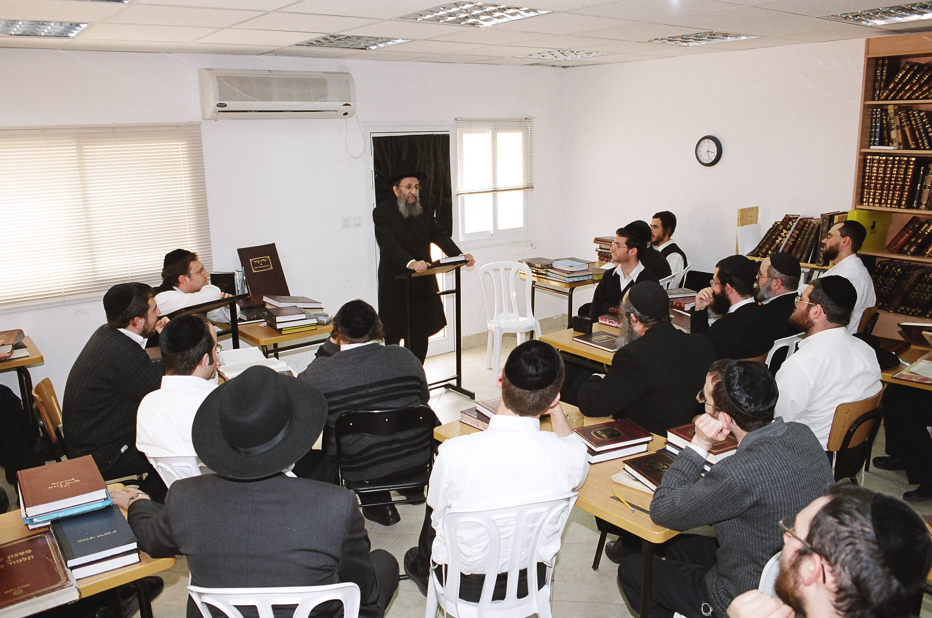 Лекция раввина Ашера Кушнира перед учениками раввинского колледжа